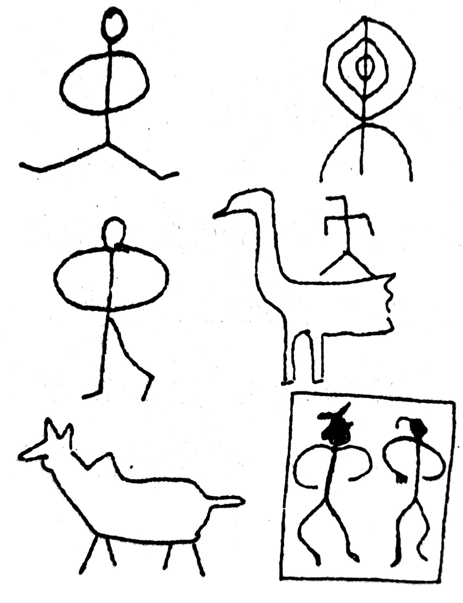 සිංහල: බිල්ලෑව ගුහා සිතුවම් කිහිපයක්